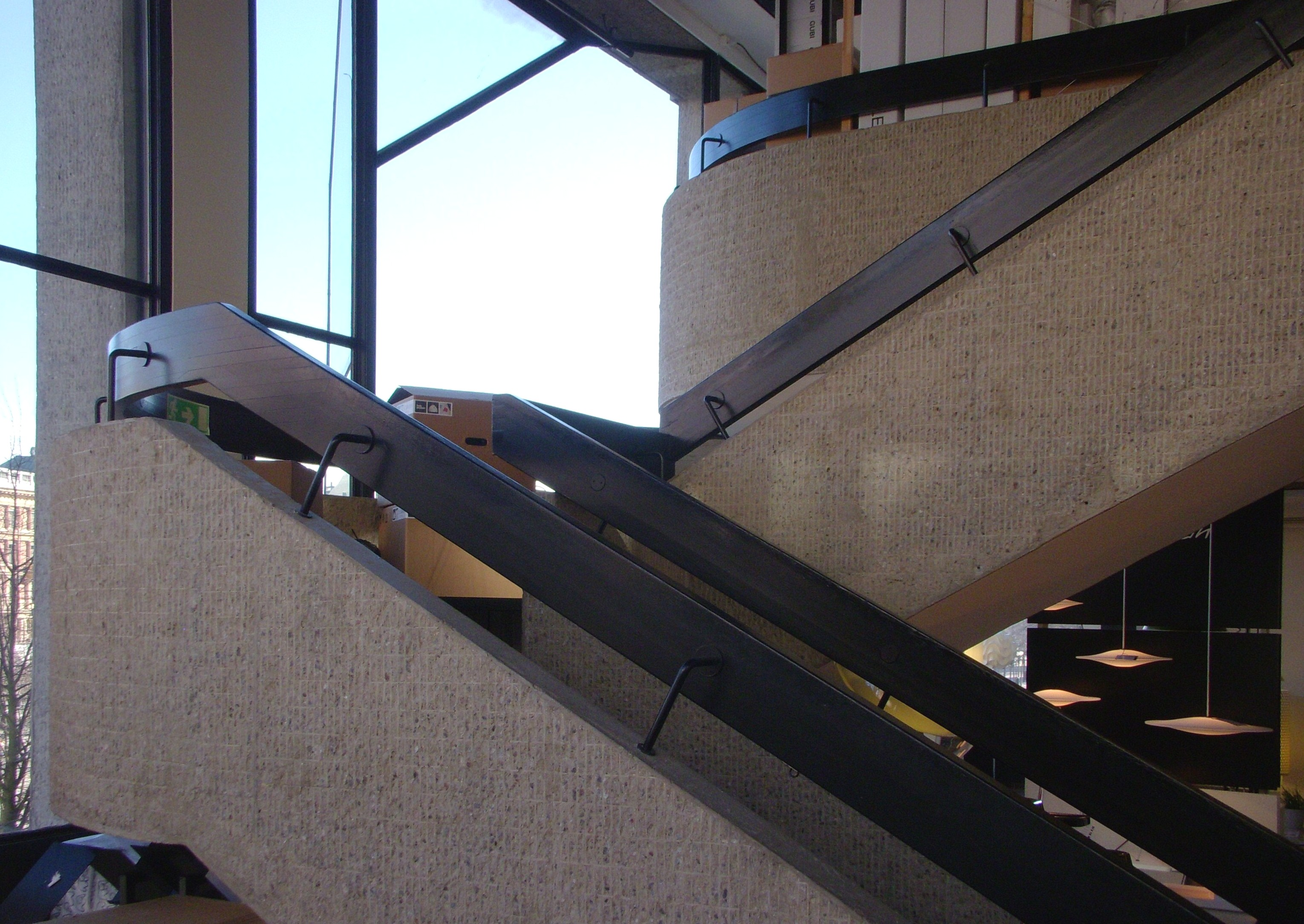 Sverigehusets huvudtrappa